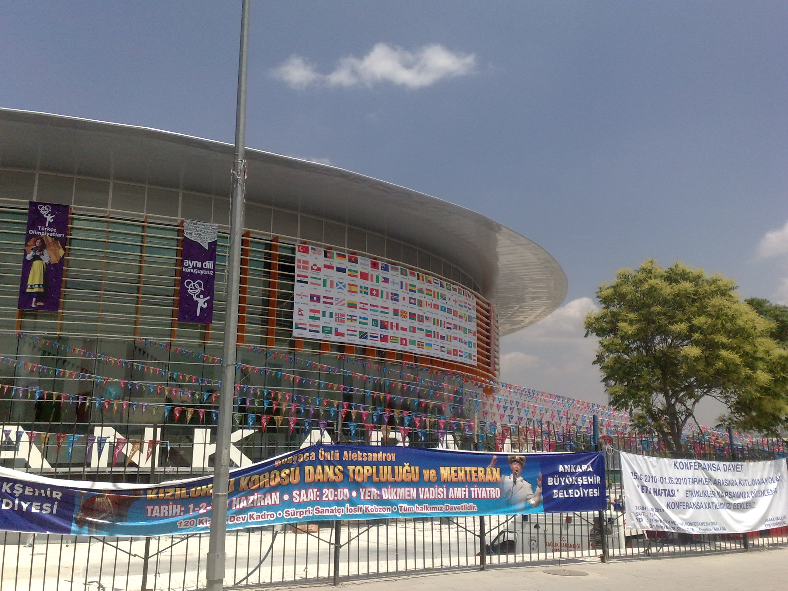 Ankara Spor Salonu.